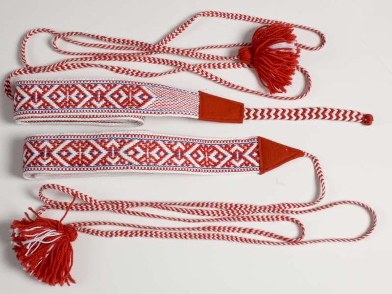 Et par skallebånd vevd av duojár Sara Valborg Trasti fra Unjárgga gielda, Nesseby kommune, Finnmark, Norge.